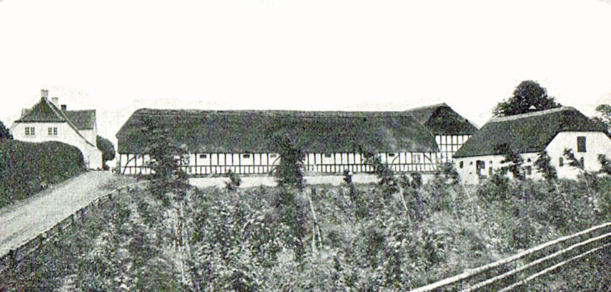 Orelund er en lille hovedgård, som nævnes første gang i 1535. Orelund var en avlsgård under Wedellsborg Gods fra 1850 til 1916. Gården ligger i Sandager Sogn, Båg Herred, Assens Kommune. Hovedbygningen er opført i 1839.